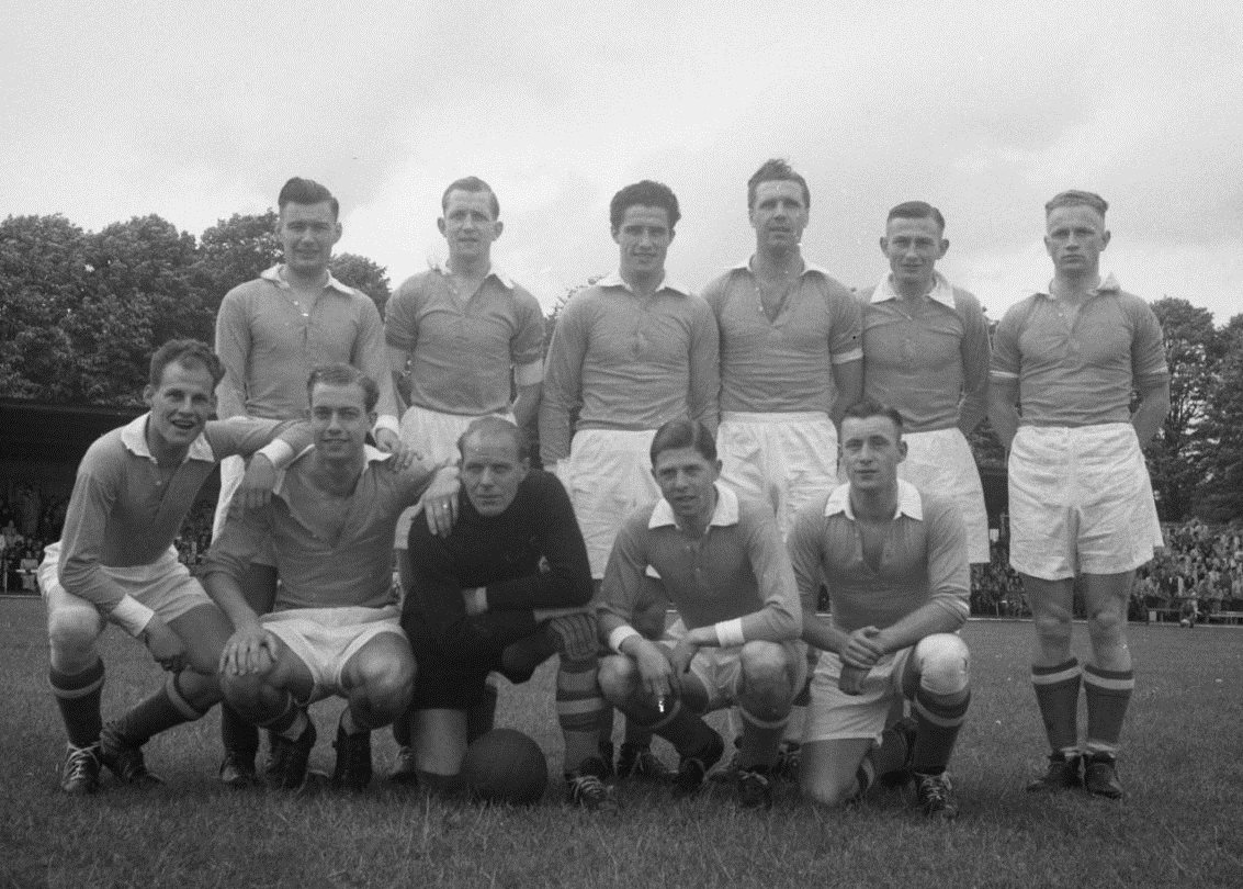 Willem II tegen Bleijerheide. Willem II elftal.